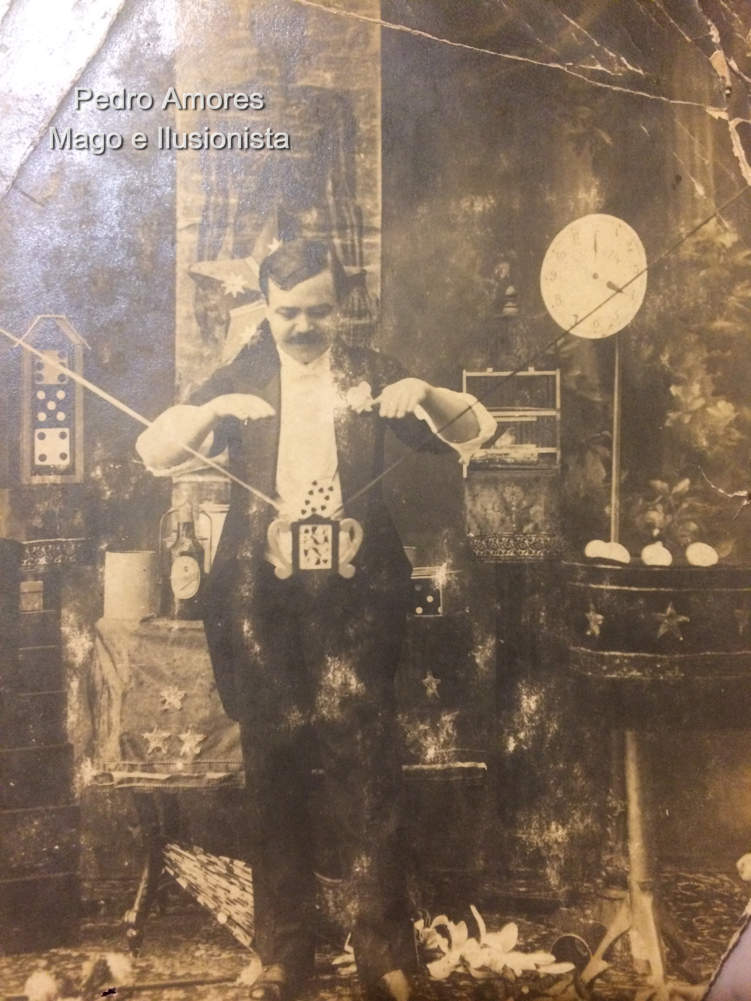 Mago e Ilusionista Español